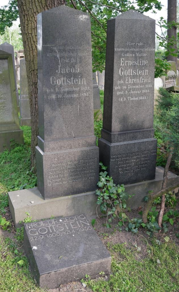 Grab des Chirurgen Georg Gottstein (1868-1936) auf dem Alten Jüdischen Friedhof in Breslau